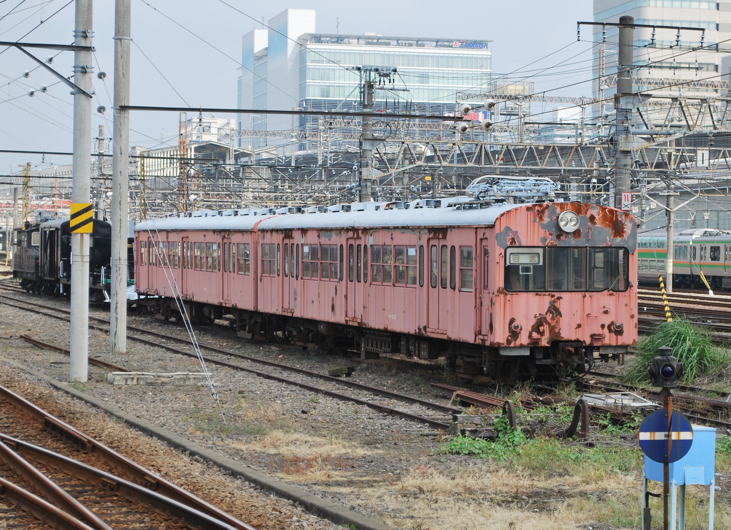 上信電鉄100型電車。代用倉庫として使用。2012年11月に塗り替えられている。